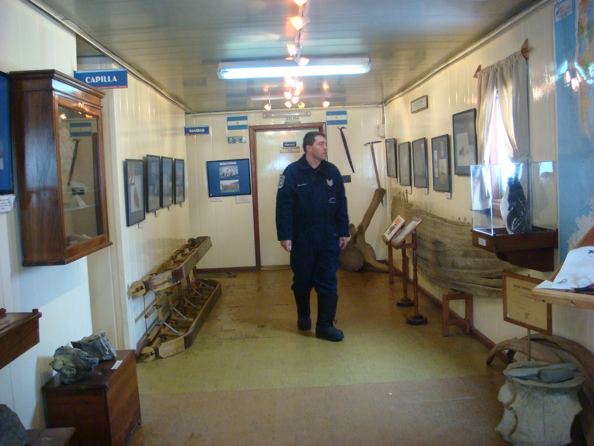 El Museo «Patrulla Soberanía» en la Base Marambio de la Antártida Argentina